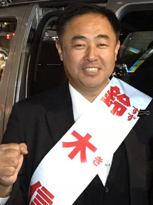 新小岩駅南口ロータリー 鈴木信行